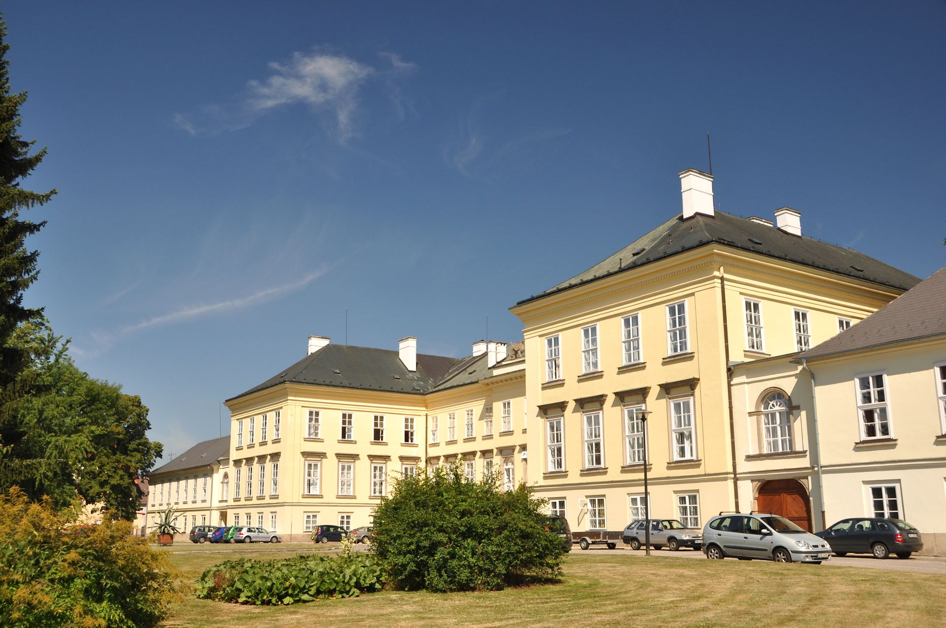 Nové Hrady